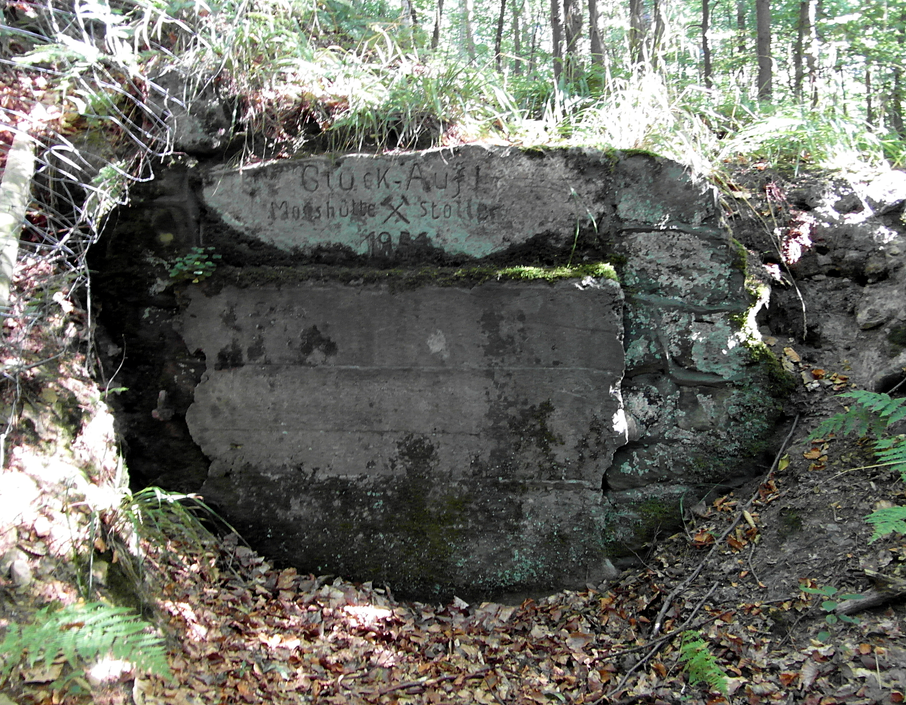 Das Mundloch des Mooshüttestollen ist zubetoniert